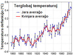 Ĉi tiu bildo estis kreita surbaze de la anglalingva originalo, kiu estis uzebla sub GFDLo. Mia tradukita versio do ankaŭ estas sub GFDL. Kategorio:Bildoj sub GFDL